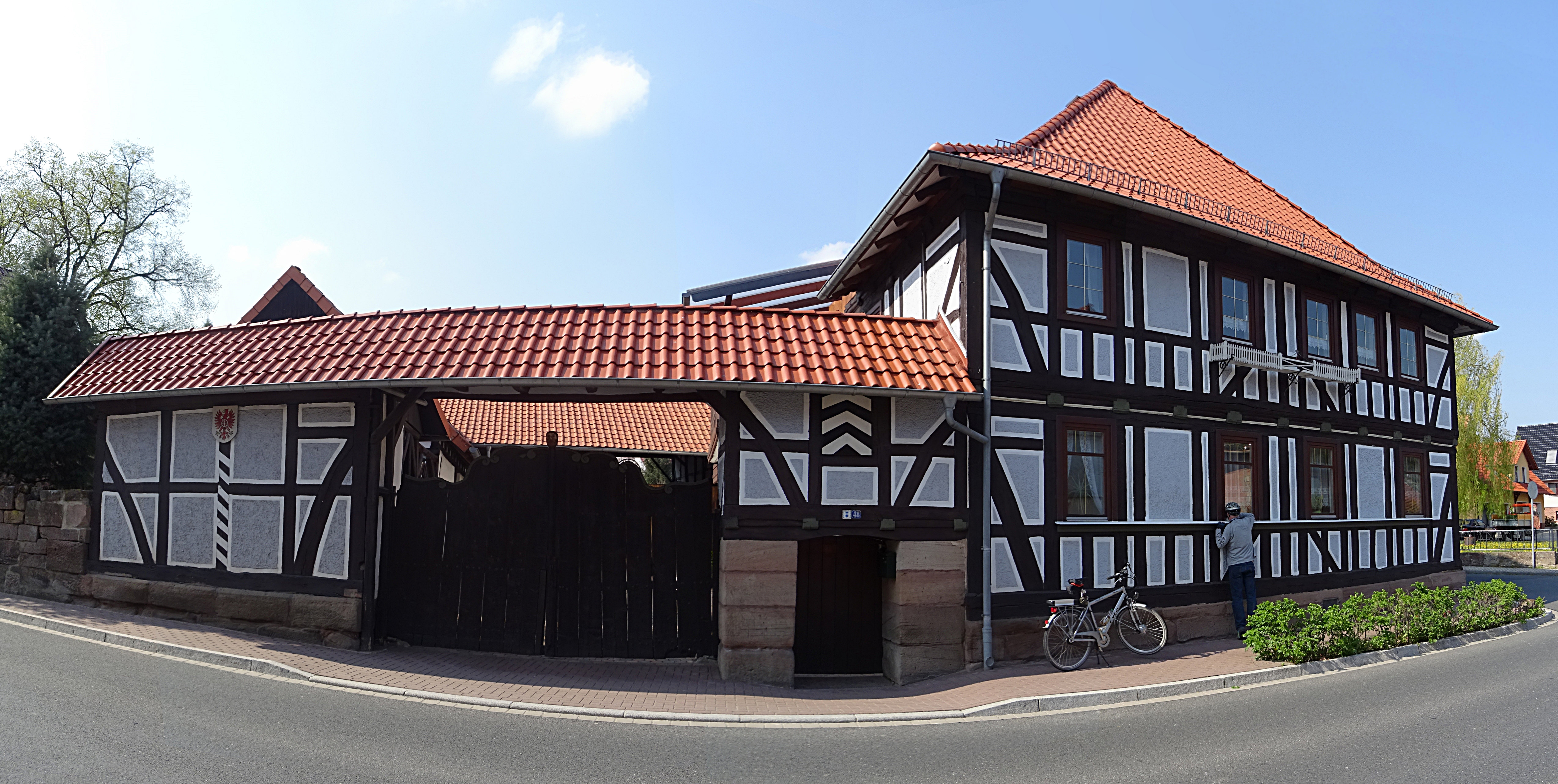 Historisches Zollhaus in Lenterode mit Torhäuschen, Wachstube, Zöllnerstube, Übernachtungs- und Gaststätte sowie Ausspanne. Vermutlich um 1823 erbaut diente es zur Durchsetzung der Zollordnung an der eichsfeldischen Kontrollbezirkslinie zwischen Hessen und Preußen.